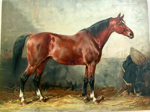 Mecklenburger